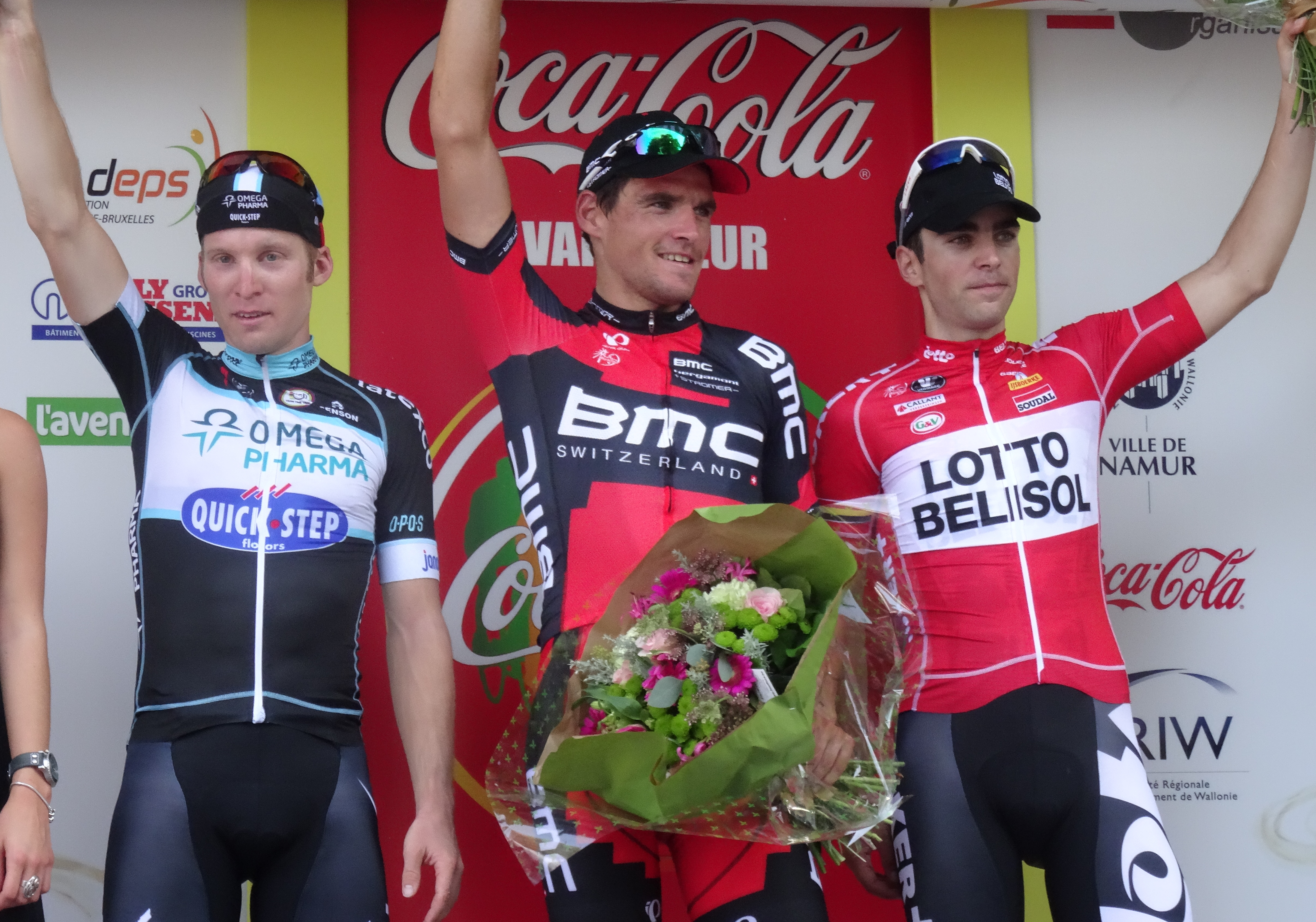 Reportage photographique réalisé le mercredi 17 septembre à l'occasion de l'arrivée du Grand Prix de Wallonie 2014 à la citadelle de Namur, Belgique.